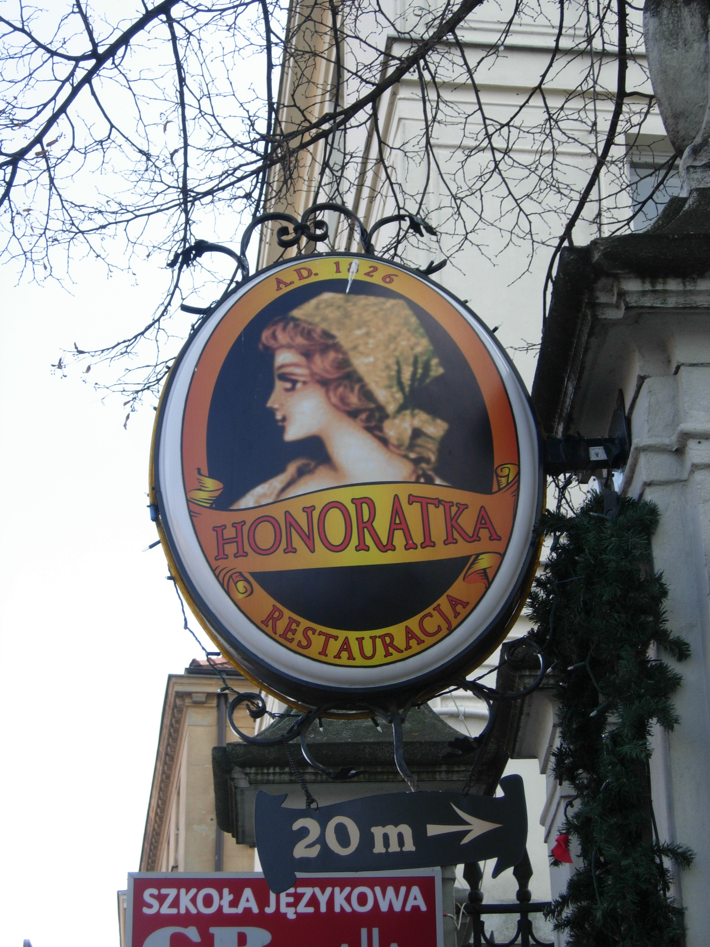 Szyld Honoratki